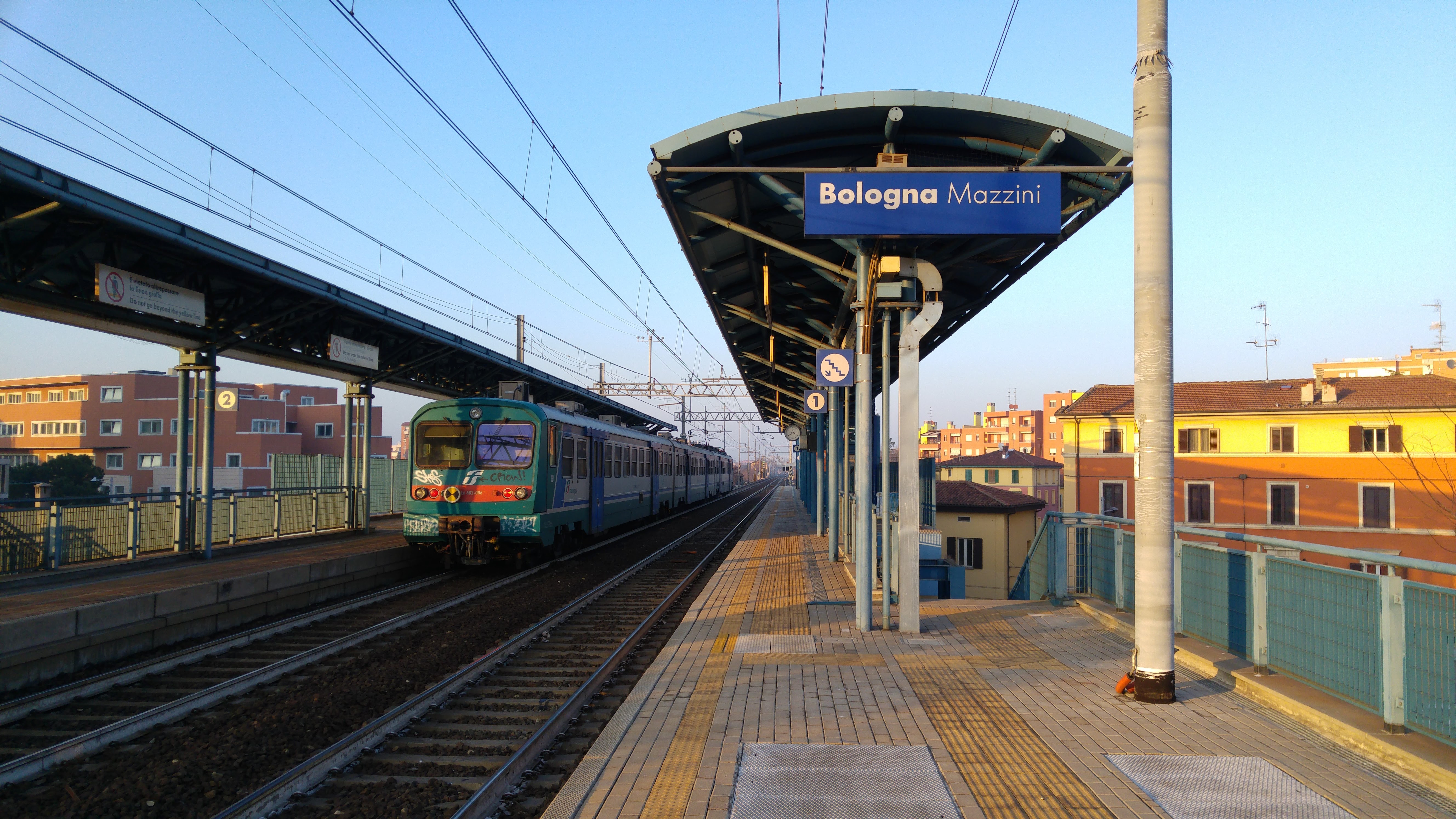 Stazione di Bologna Mazzini. Il regionale 6546 da Prato Centrale a Bologna Centrale effettua fermata sul binario 2.